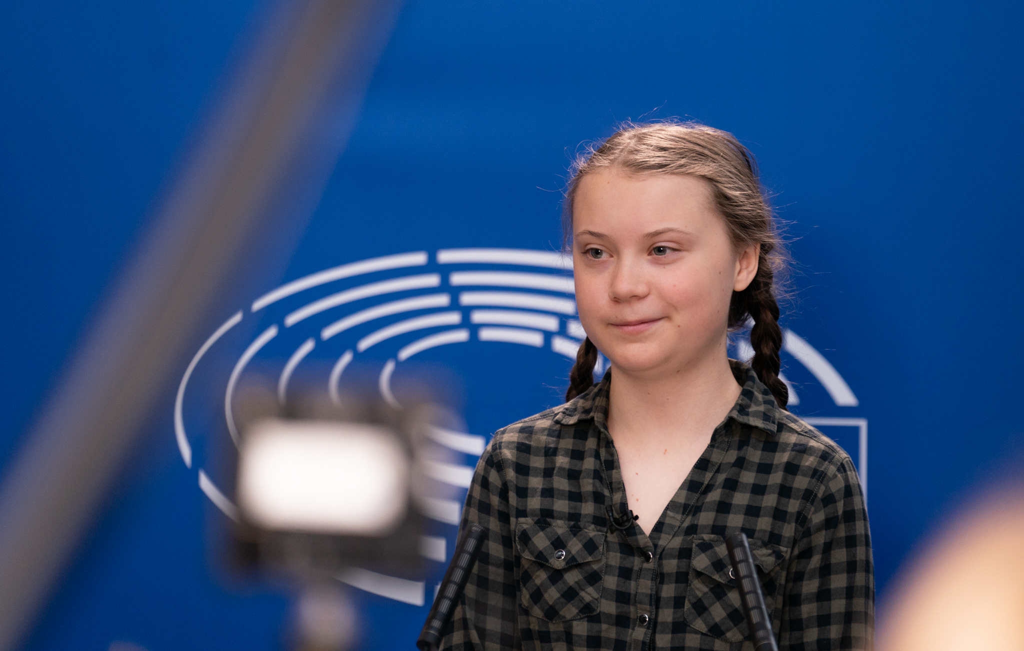 2019 france strasbourg EP EU political leader plenary session european union euroopaparlament europa parlamentet europas parlaments europe european citizens parliament europejski europeu parlamentul europos parlamentas europský europäisches parlament eurostudio európai ewropeweuropees parlaimintn aheorpa euroopan parlamente vropski parlamentil parlamento europeo parlamentti parlamentet parlement européen Parlaimint na hEorpa SONY ALPHA 9